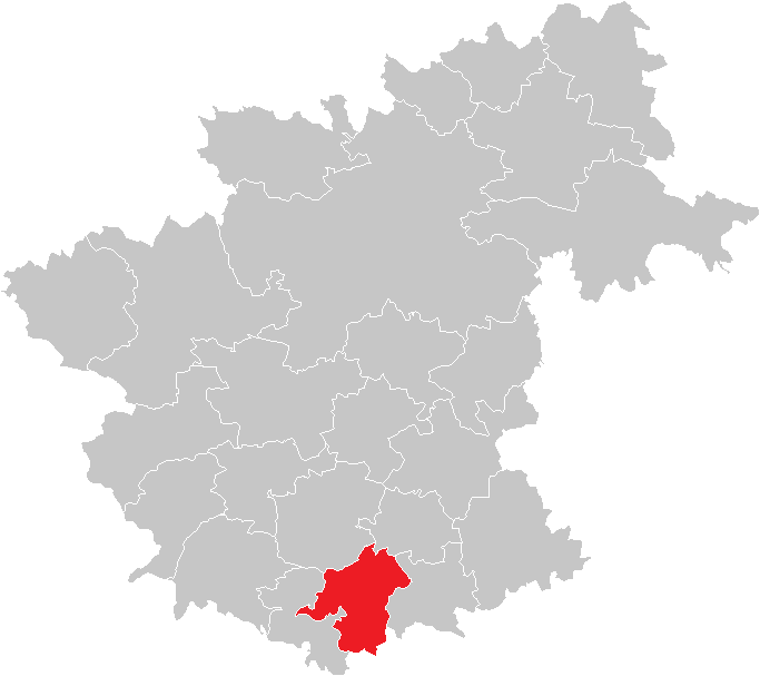 Bezirk Zwettl